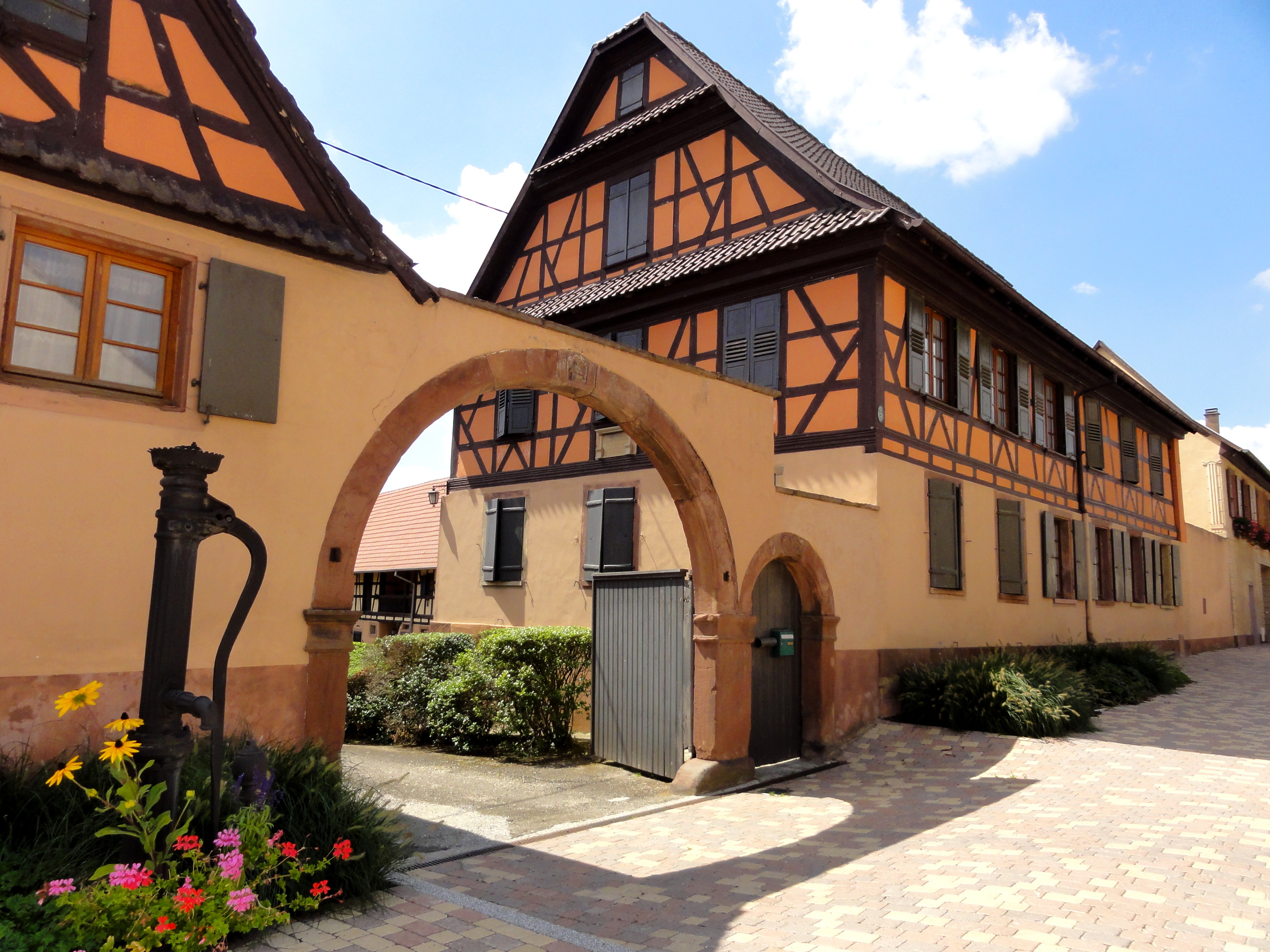 Alsace, Bas-Rhin, Truchtersheim, Ferme (XVIIIe-XIXe), 5 rue de l'Eglise. .